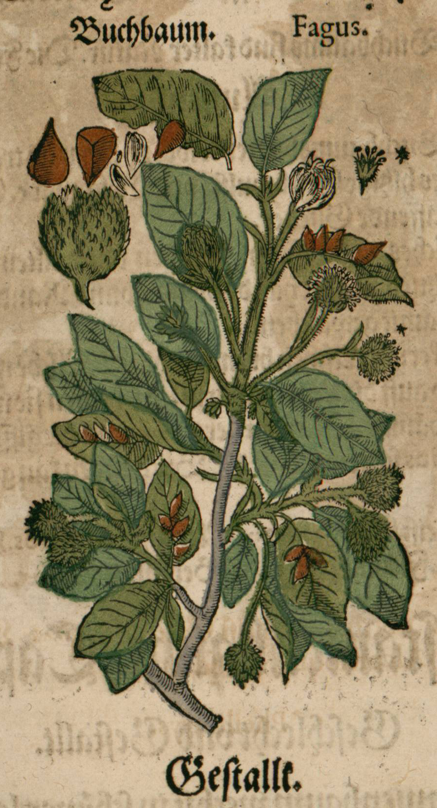 Représentation d'un Hêtre (Fagus sylvatica).